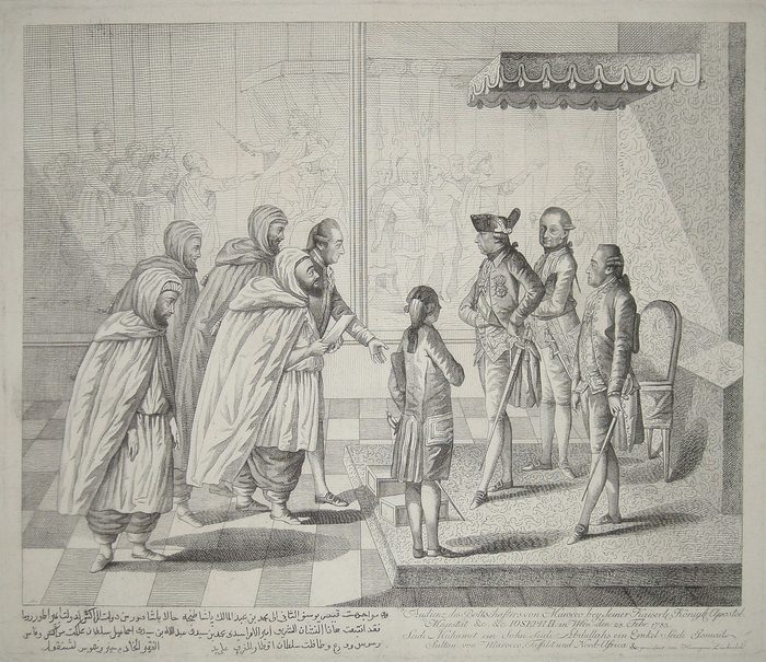 Audienz des Botschafters von Marokko bei Kaiser Joseph II. in Wien am 28. Februar 1783